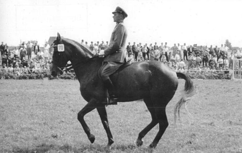 Müller Zentralbild Ramm 1.9.1963 Deutsche Meisterschaften im Dressurreiten vom 30.8.-1.9.1963 in Halle. UBz:Der deutsche Dressurmeister 1961 und 1962 Oberfeldwebel Müller (ASK Vorwärts Berlin) auf der mecklenburgischen Fuchsstute Helga bei einer Piaffe, wobei das Pferd im Takt auf der Stelle treten muß. Diese Übung gehört zum Programm der großen Olympia-Dressur und wird auch bei der deutschen Meisterschaft verlangt.